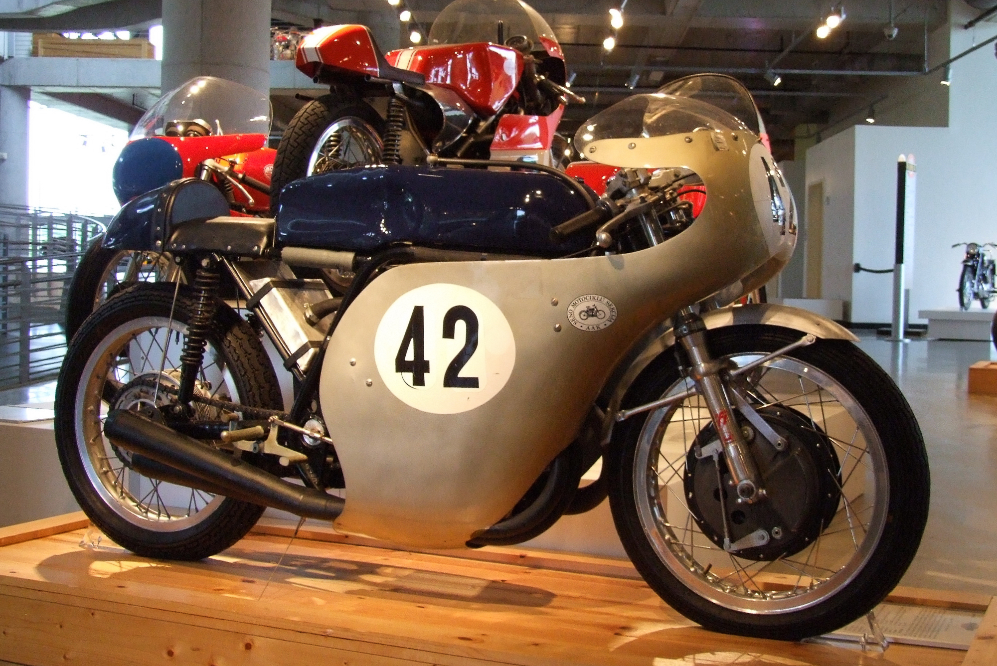 Vostok C364 (1969) im Barber Vintage Motorsports Museum, Birmingham, Alabama, USA